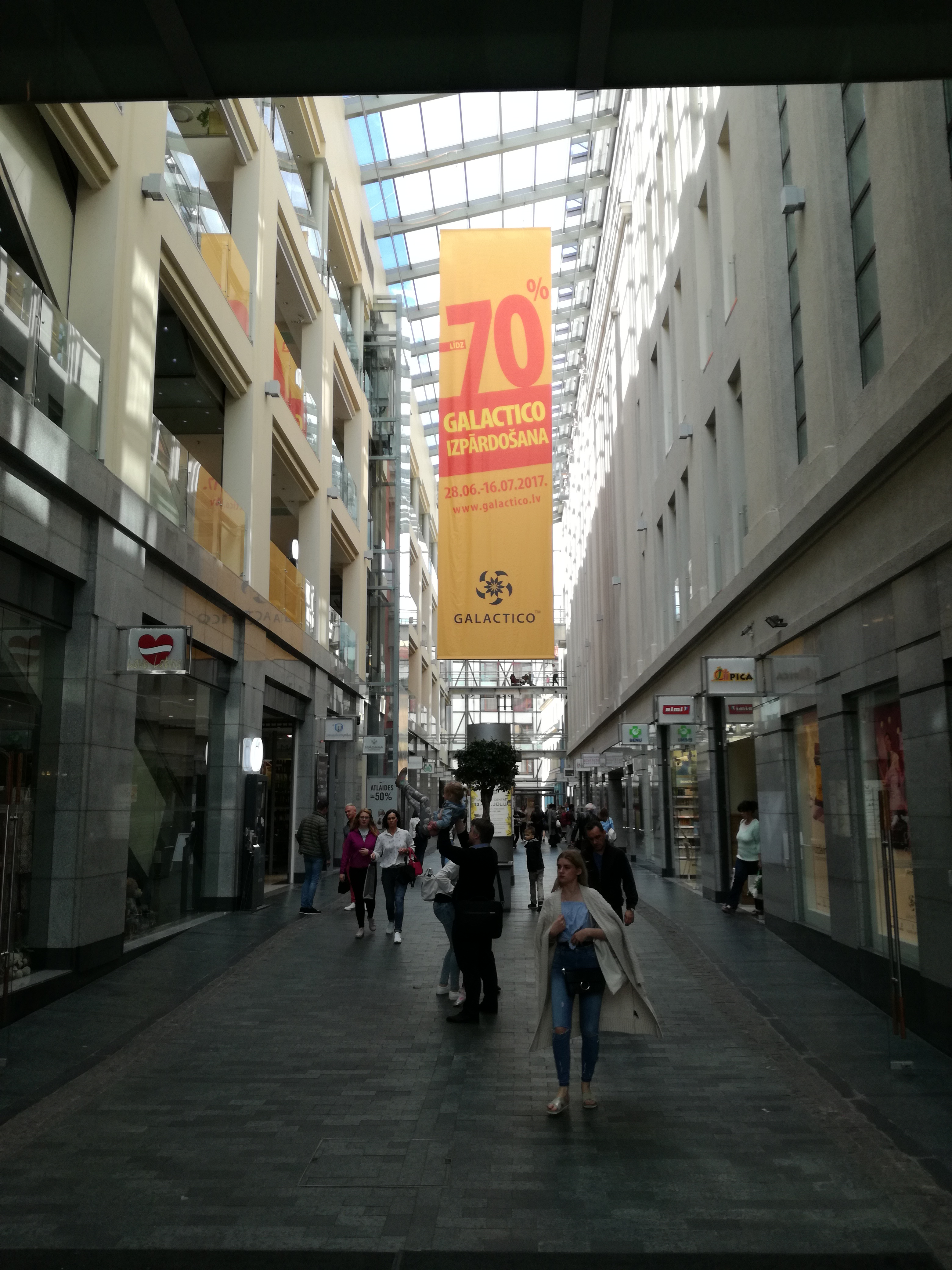 Вецрига